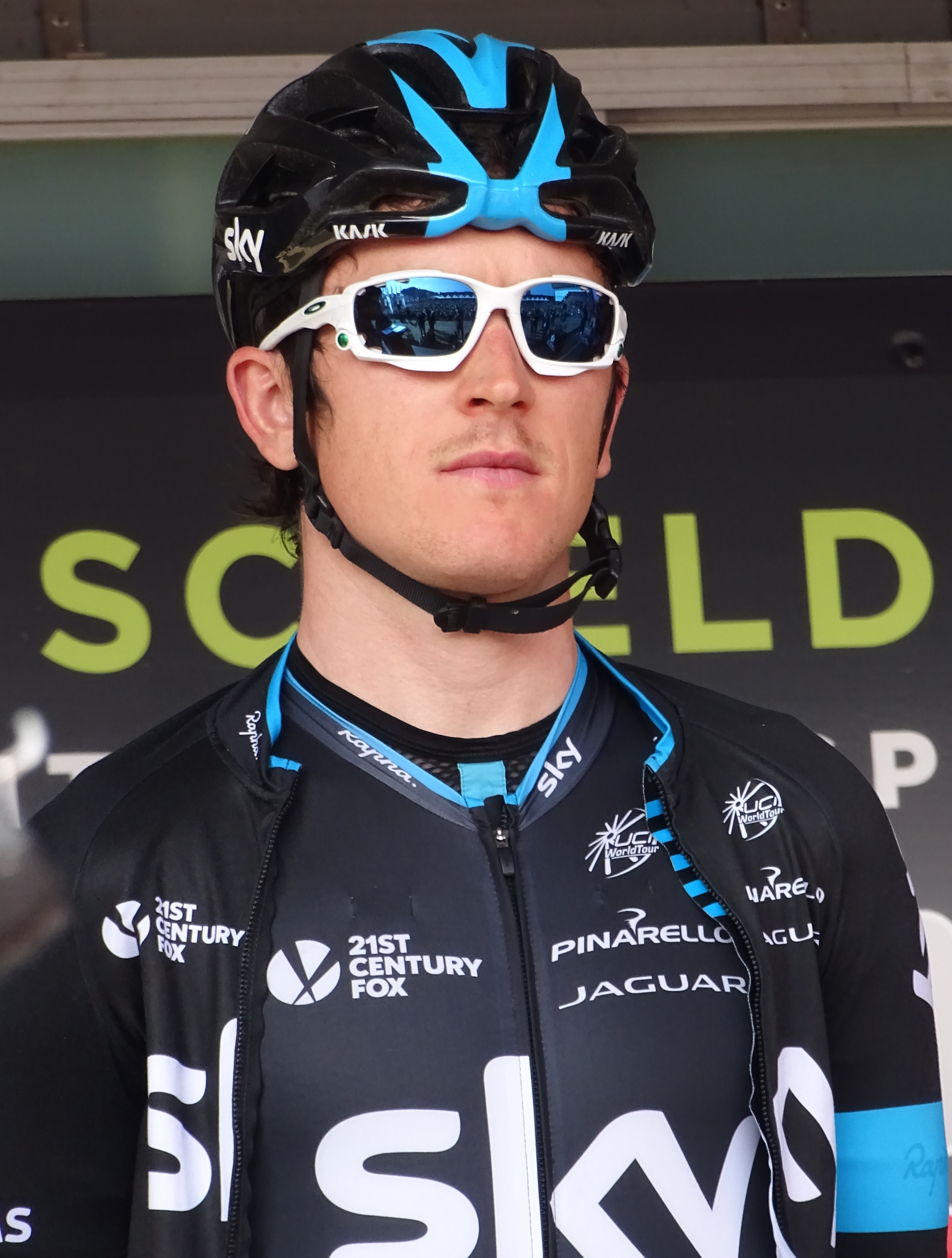 Reportage réalisé le mercredi 8 avril à l'occasion du départ du Grand Prix de l'Escaut 2015 à Anvers, Belgique.